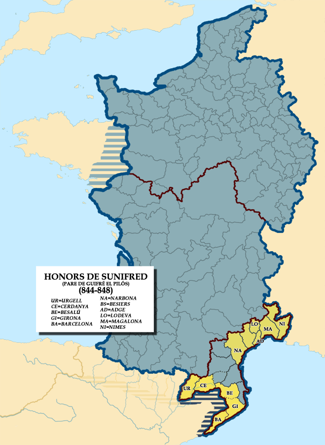 Mapa dels honors de Sunifred (844-848), pare de Guifré el Pilós